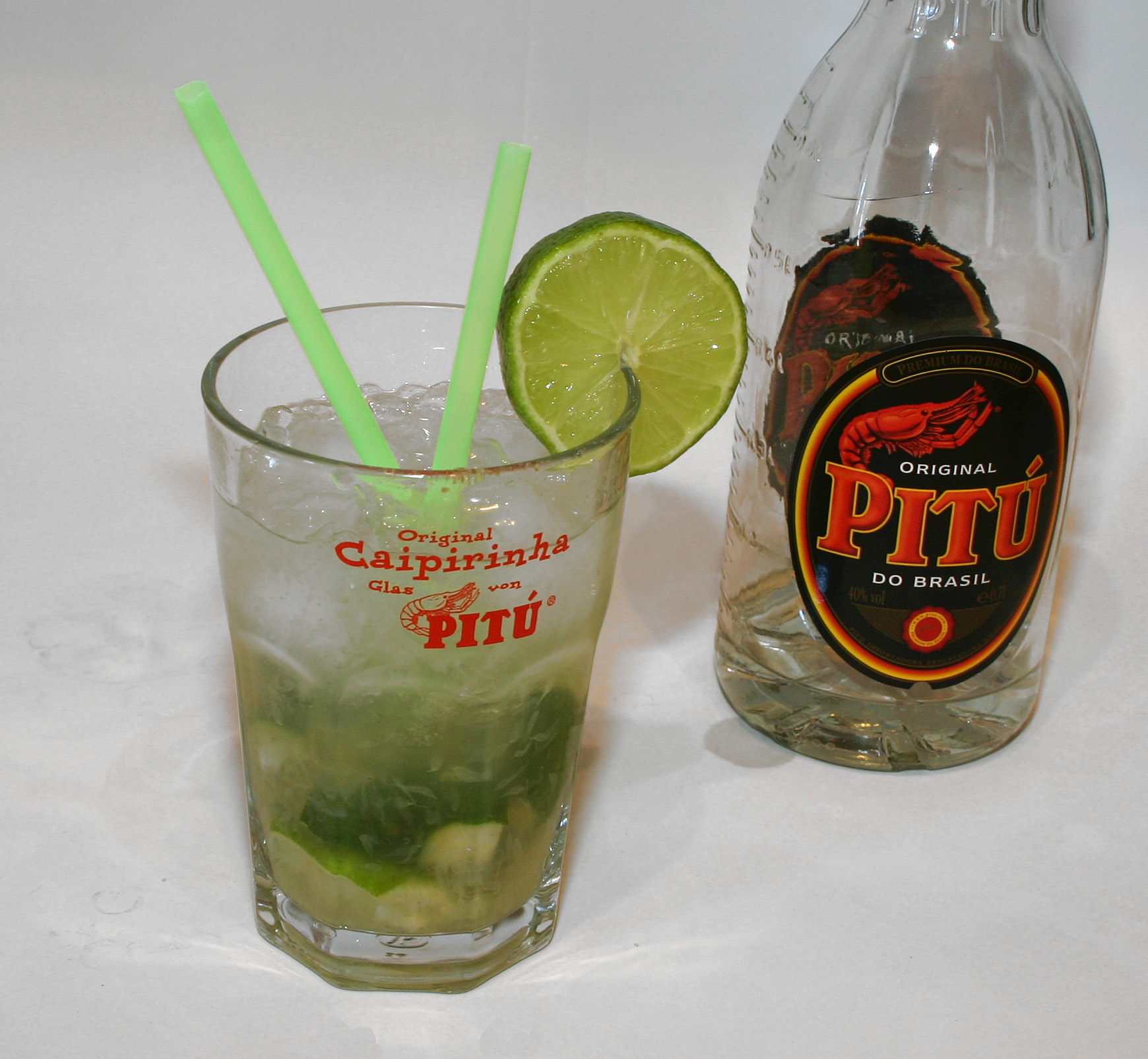 Cocktail Caipirihna a la Wikipedia